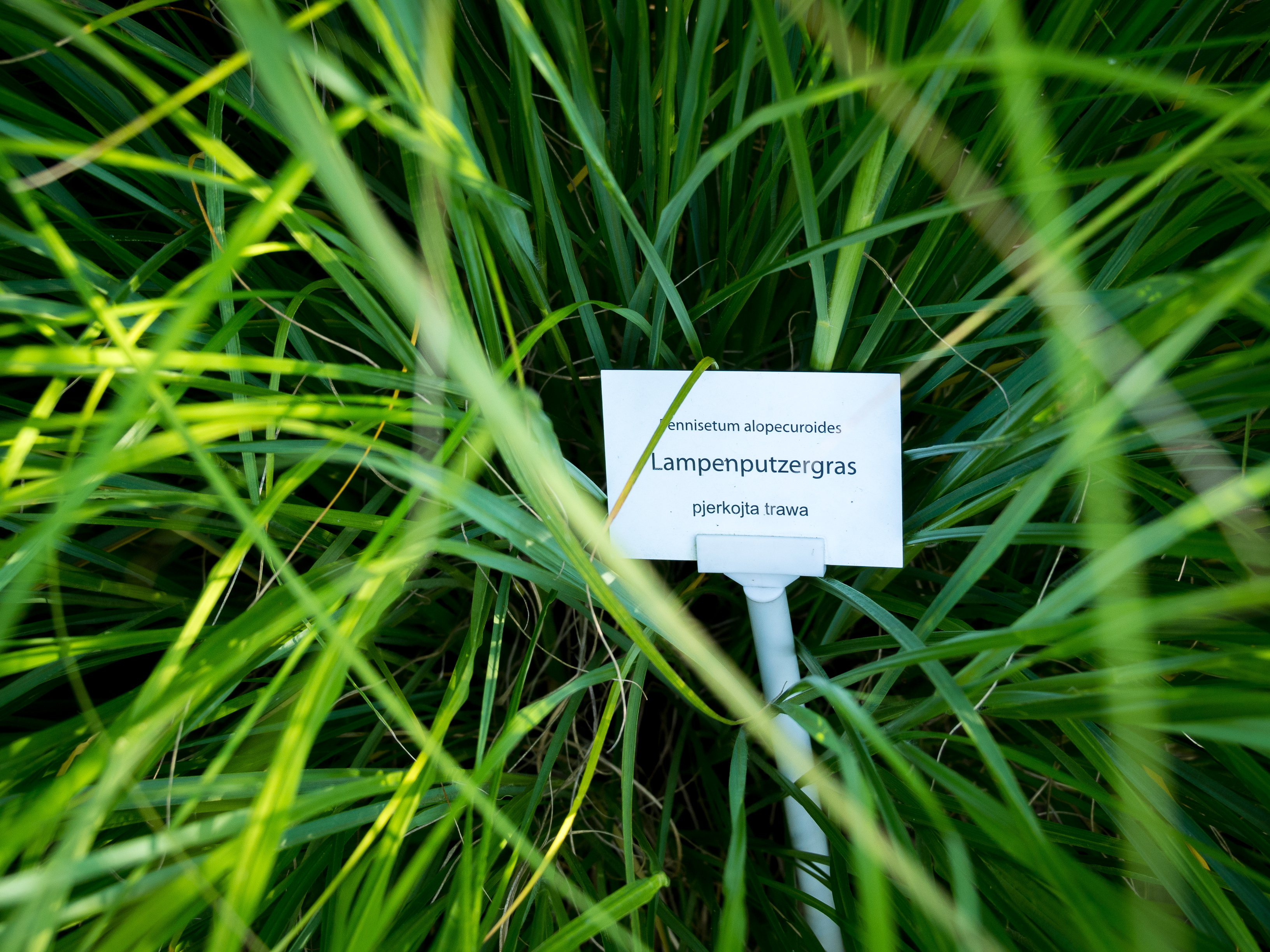 Das Lampenputzergras, lat. Pennisetum alopecuroides